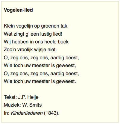 J.P. Heije (1809-1876) en W. Smits (1801-1869), tekst liedje 'Klein vogelijn op groenen tak' (1843). Opgenomen in het liedboek "Kun je nog zingen, zing dan mee" (1906).